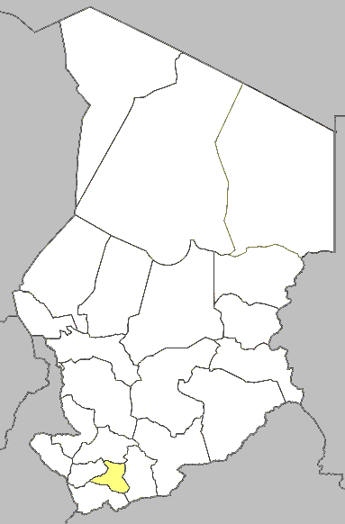 Mappa della diocesi di Doba in Ciad.